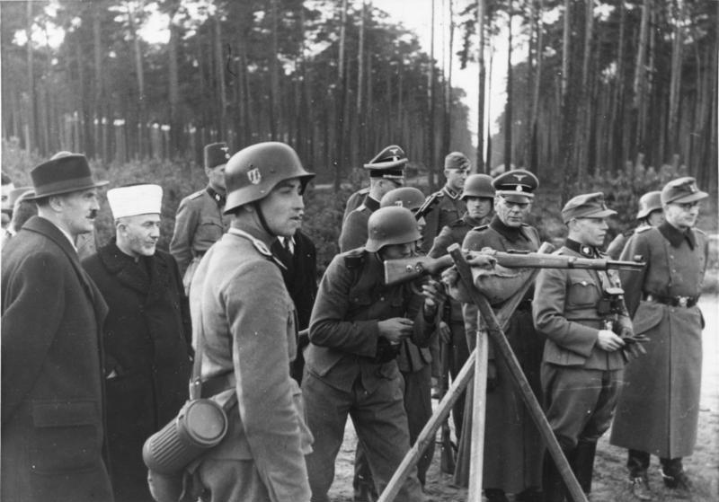 Der Grossmufti von Jerusalem bei den bosnischen Freiwilligen der Waffen-SS. Der Grossmufti überzeugt sich von der Schiessausbildung der jungen Rekruten. 13.1.1944 [Herausgabedatum] PK-Aufnahme des SS-Kriegsberichter Gösling (Wb)